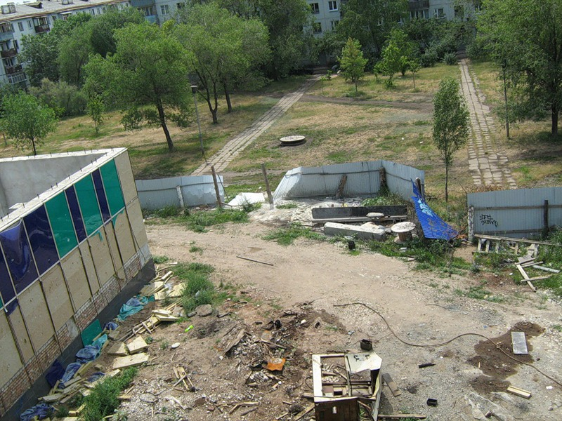 Заброшенное строительство ФОК "Динамо" в Самаре.